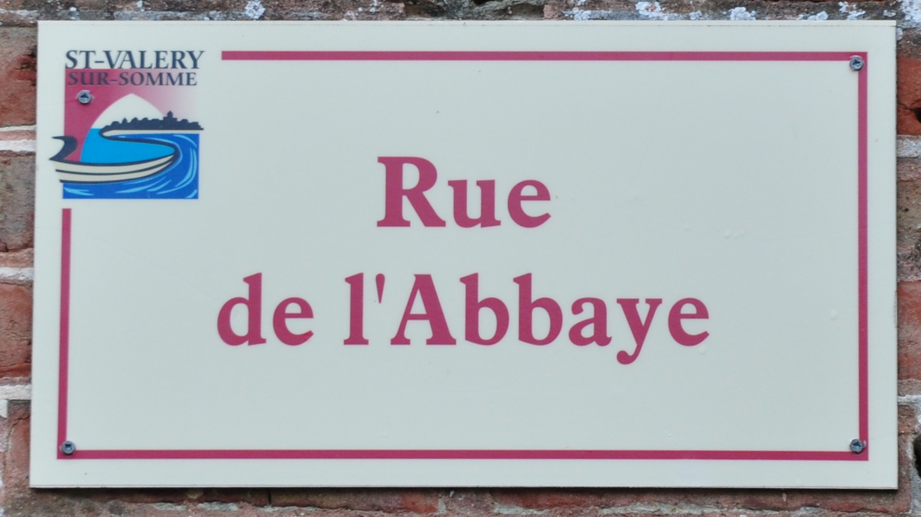 Plaque de la Rue de l'Abbaye, à Saint-Valery-sur-Somme